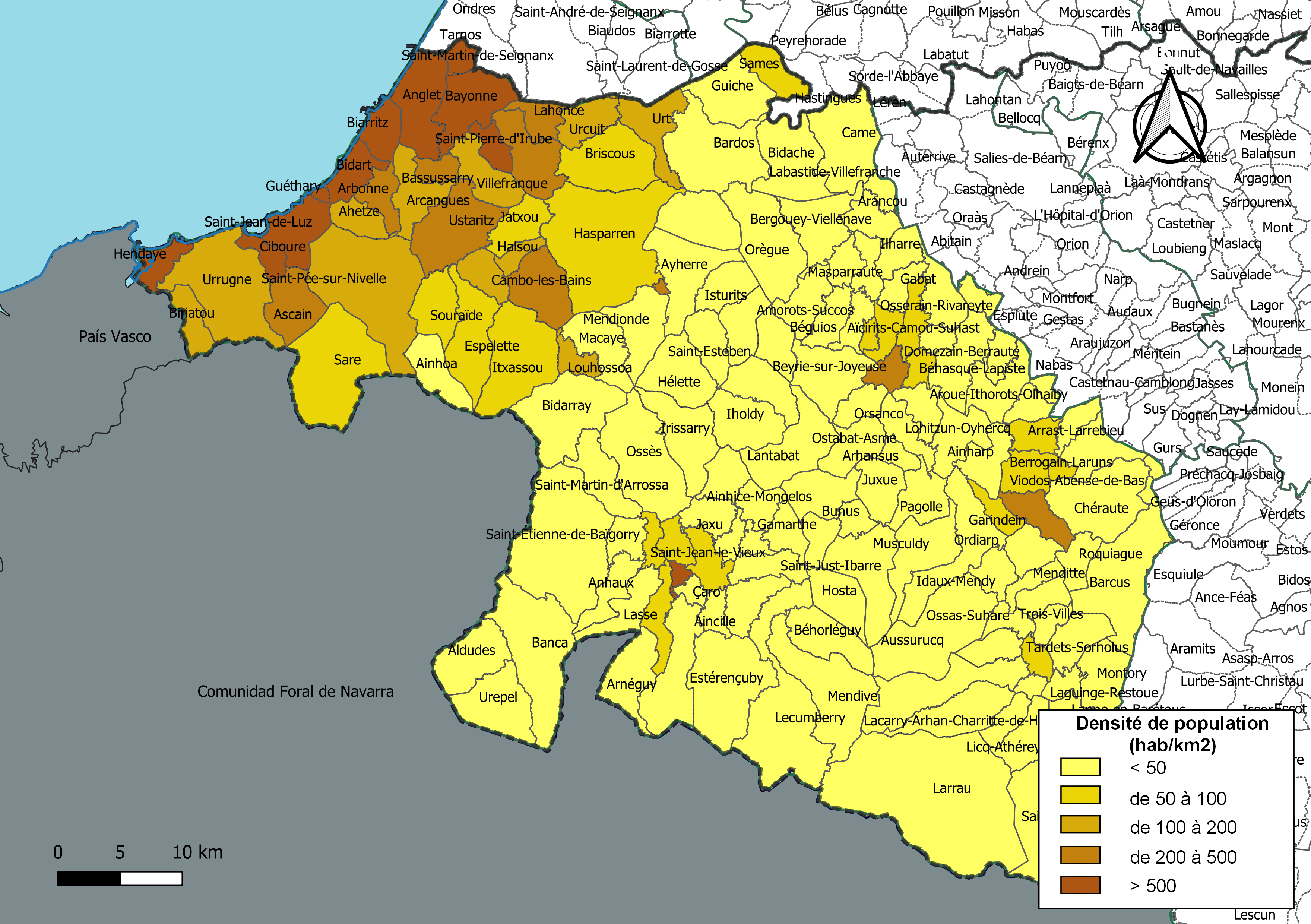 Carte des densités de population (millésimée 2016) des communes de la Communauté d'agglomération du Pays Basque, département des Pyrénées-Atlantiques, France. Composition au 1er janvier 2019.